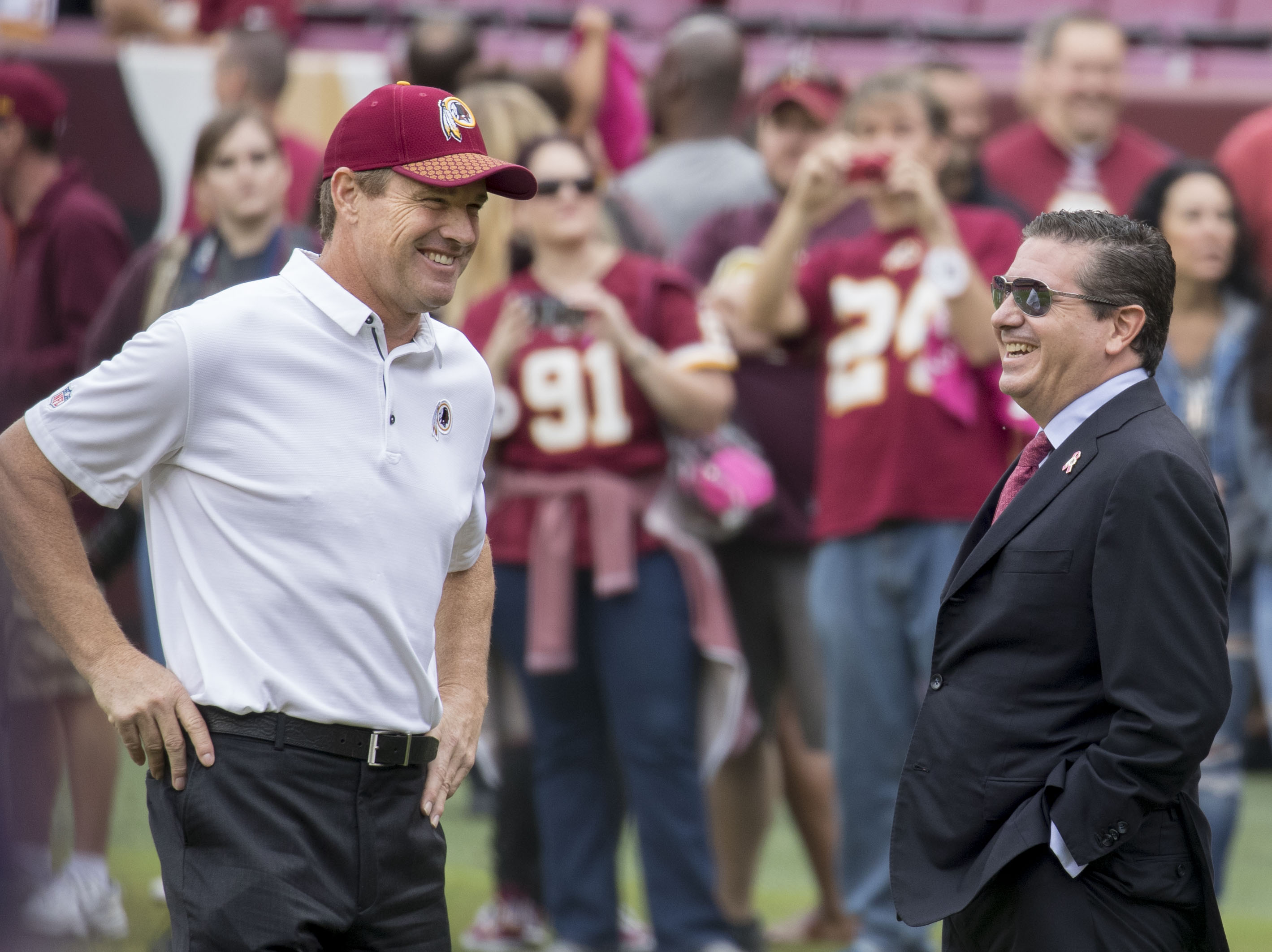 49ers at Redskins 10/15/17